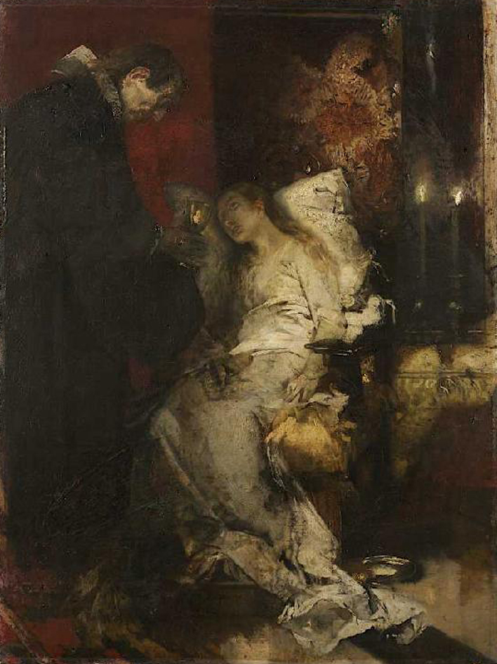 study